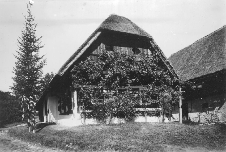 Kocenova rojstna hiša na Hotunjah ob priliki vzidave spominske plošče, sezidana leta 1755.